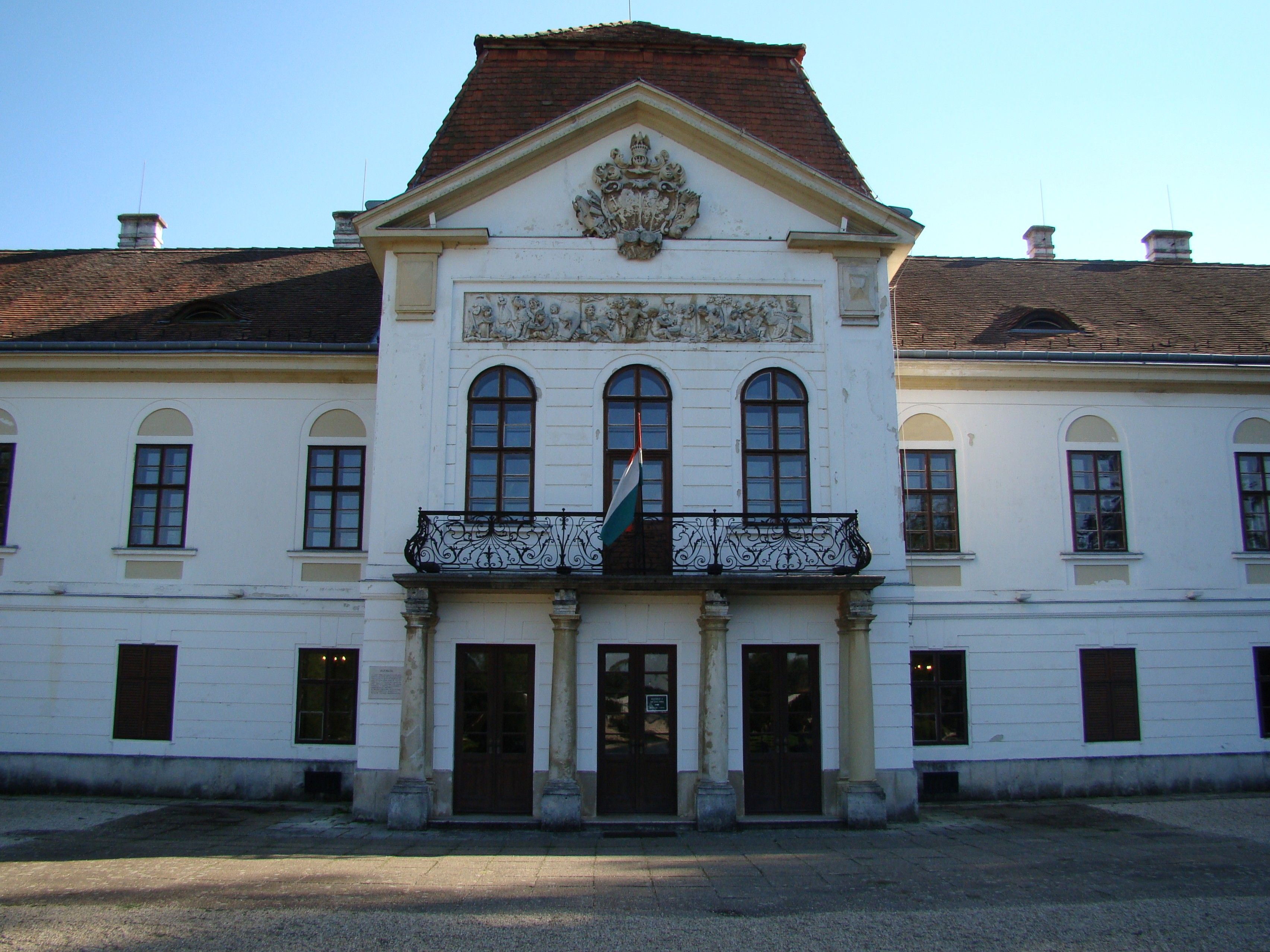 Széchenyi-kastély, Nagycenk – Széchenyi Emlékmúzeum This is a photo of a monument in Hungary. Identifier: 18191